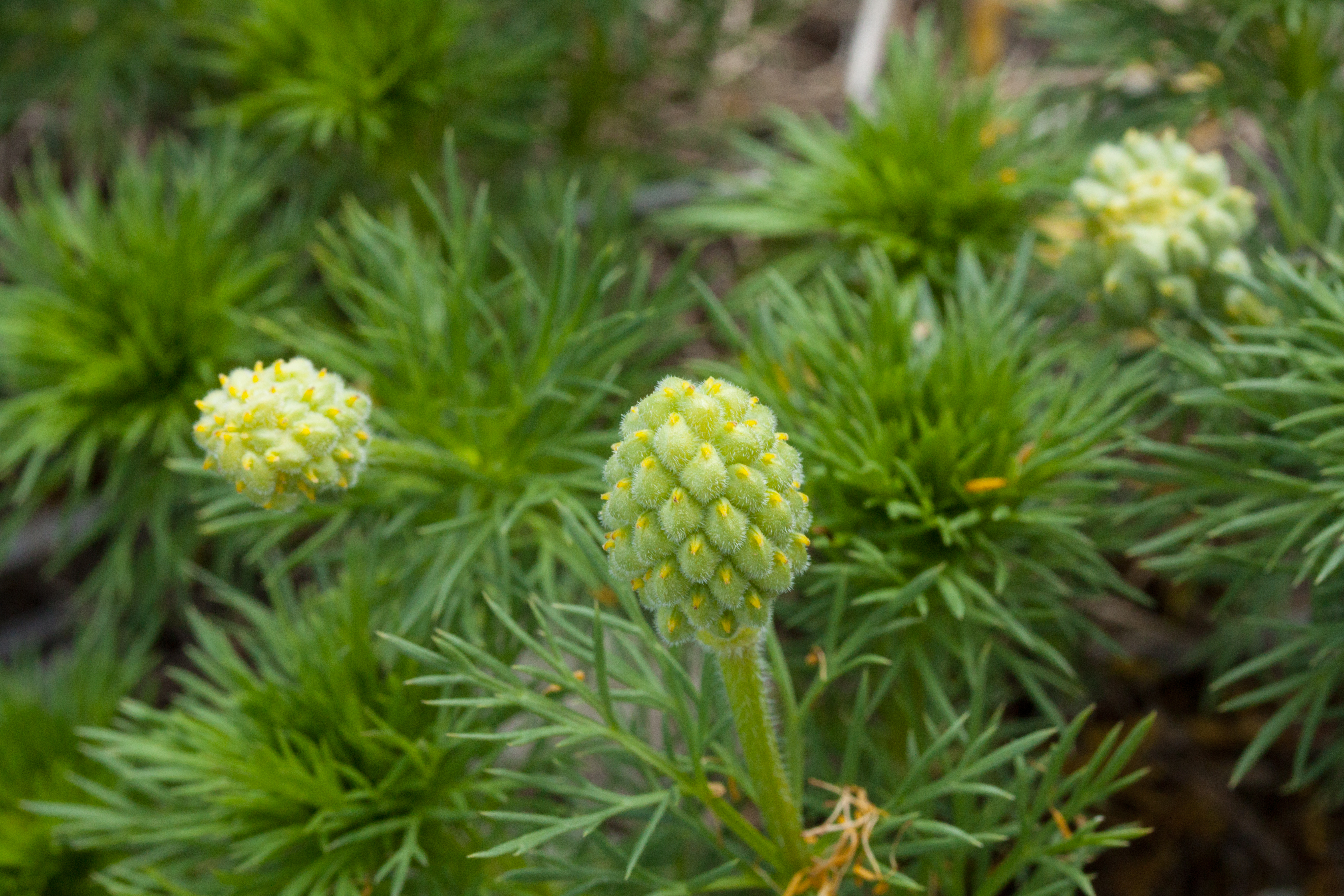 Fruchtstände des Frühlings-Adonisröschens (Adonis vernalis) im NSG Külsheimer Gipshügel bei Bad Windsheim, West-Mittelfranken, Bayern, Bundesrepublik Deutschland